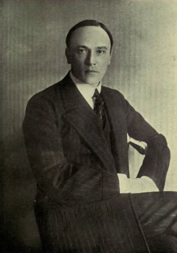 Mijaíl Tereshchenko, magnate y ministro ruso en el Gobierno Provisional.